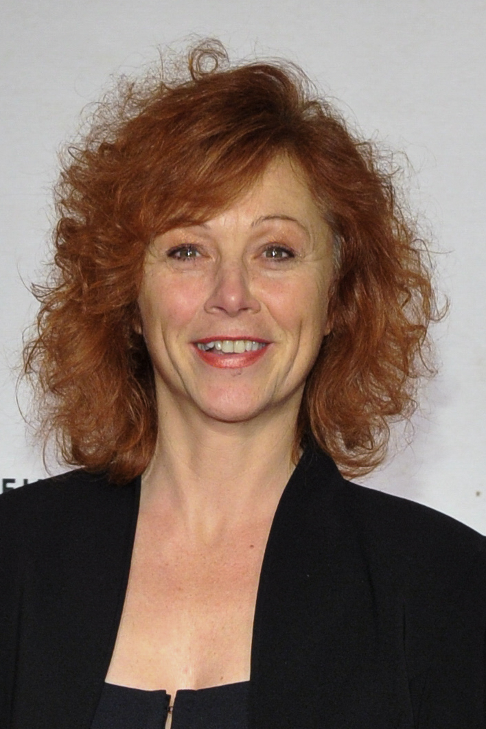 Heike Trinker auf der Premiere "Only Lovers Left Alive" in Köln am 10.12.2013